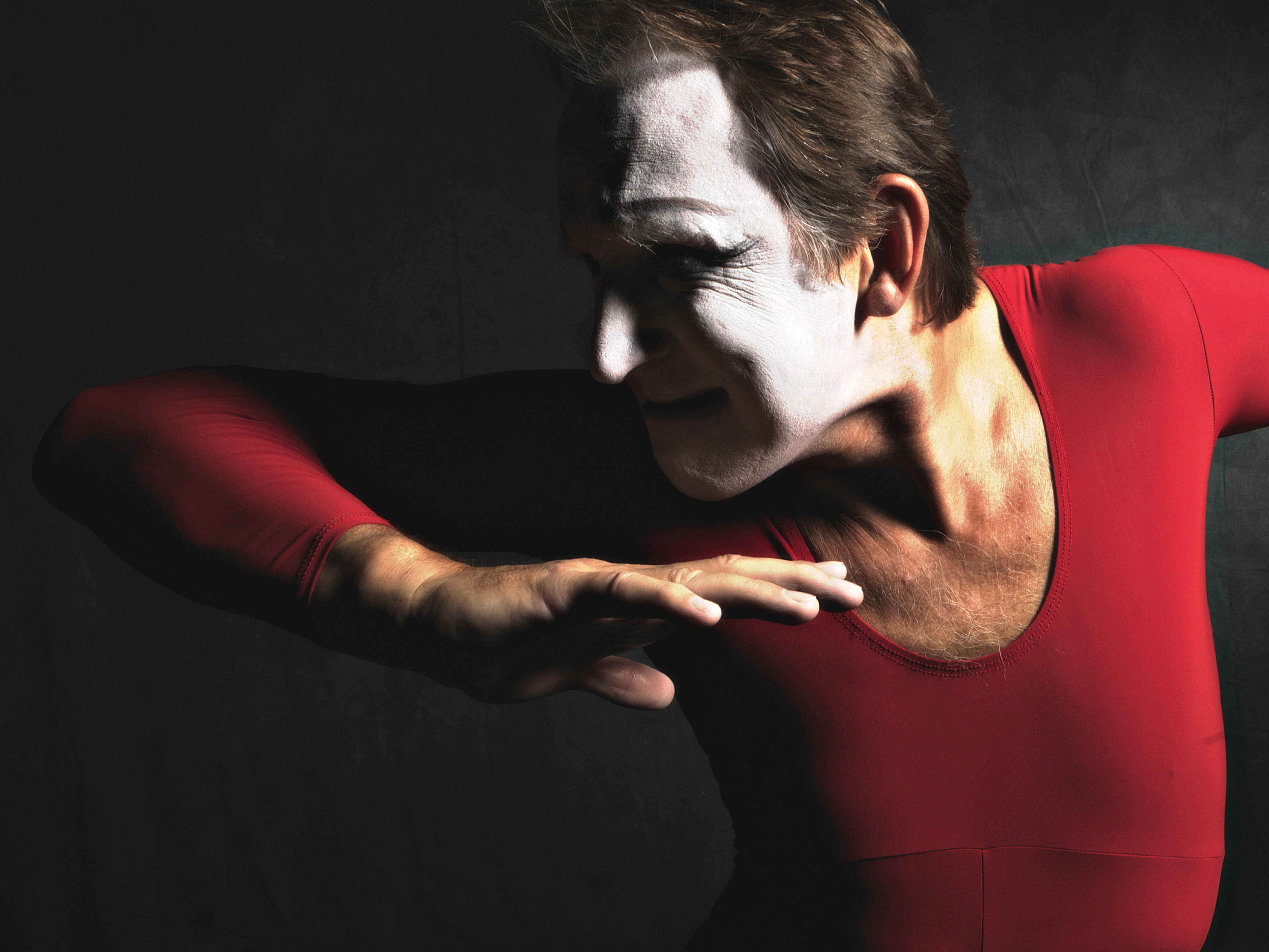 Andrey Alexander als Pantomime - Model auf Fotokina Koeln